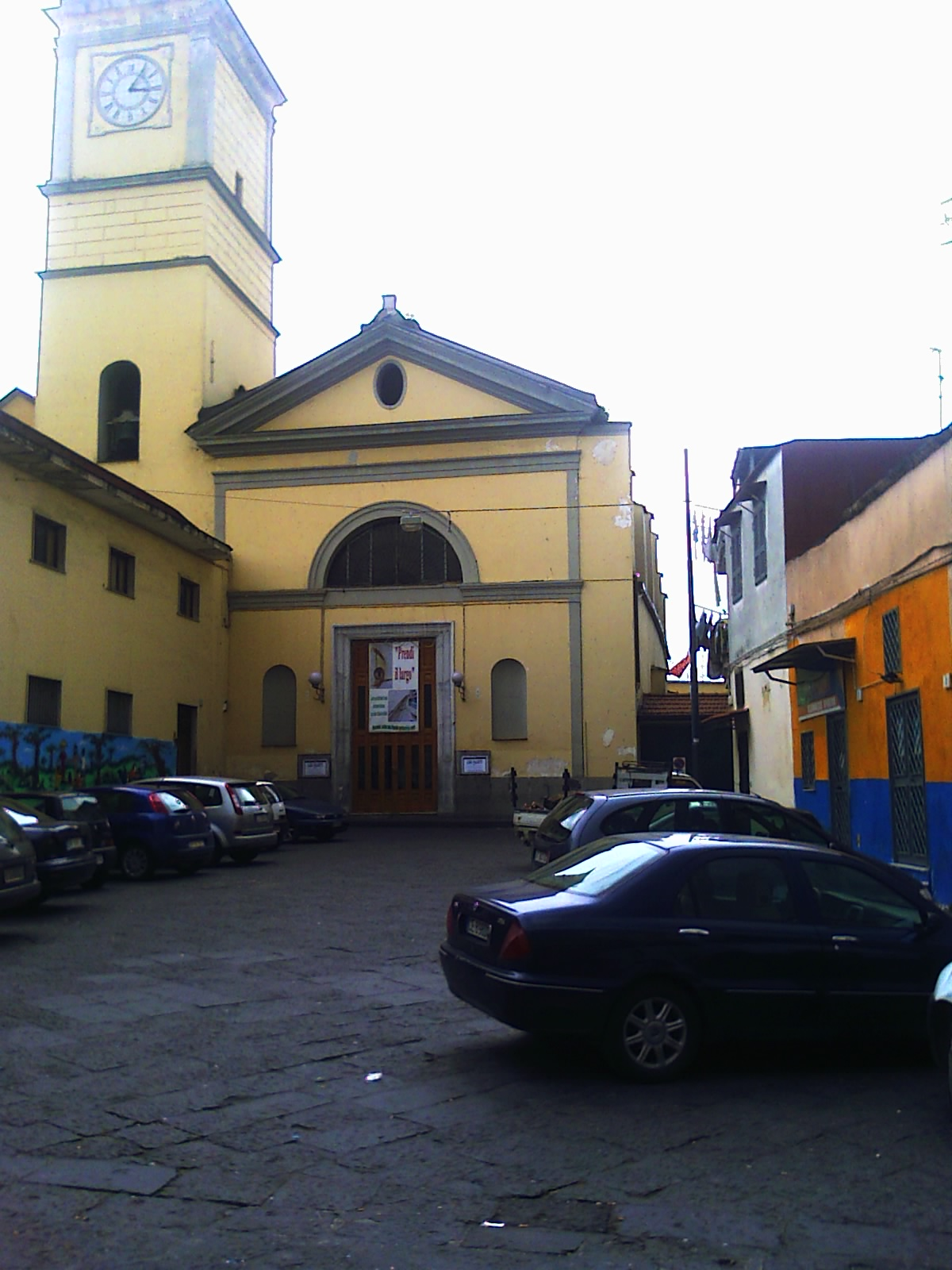 Chiesa di San Giovanni Battista